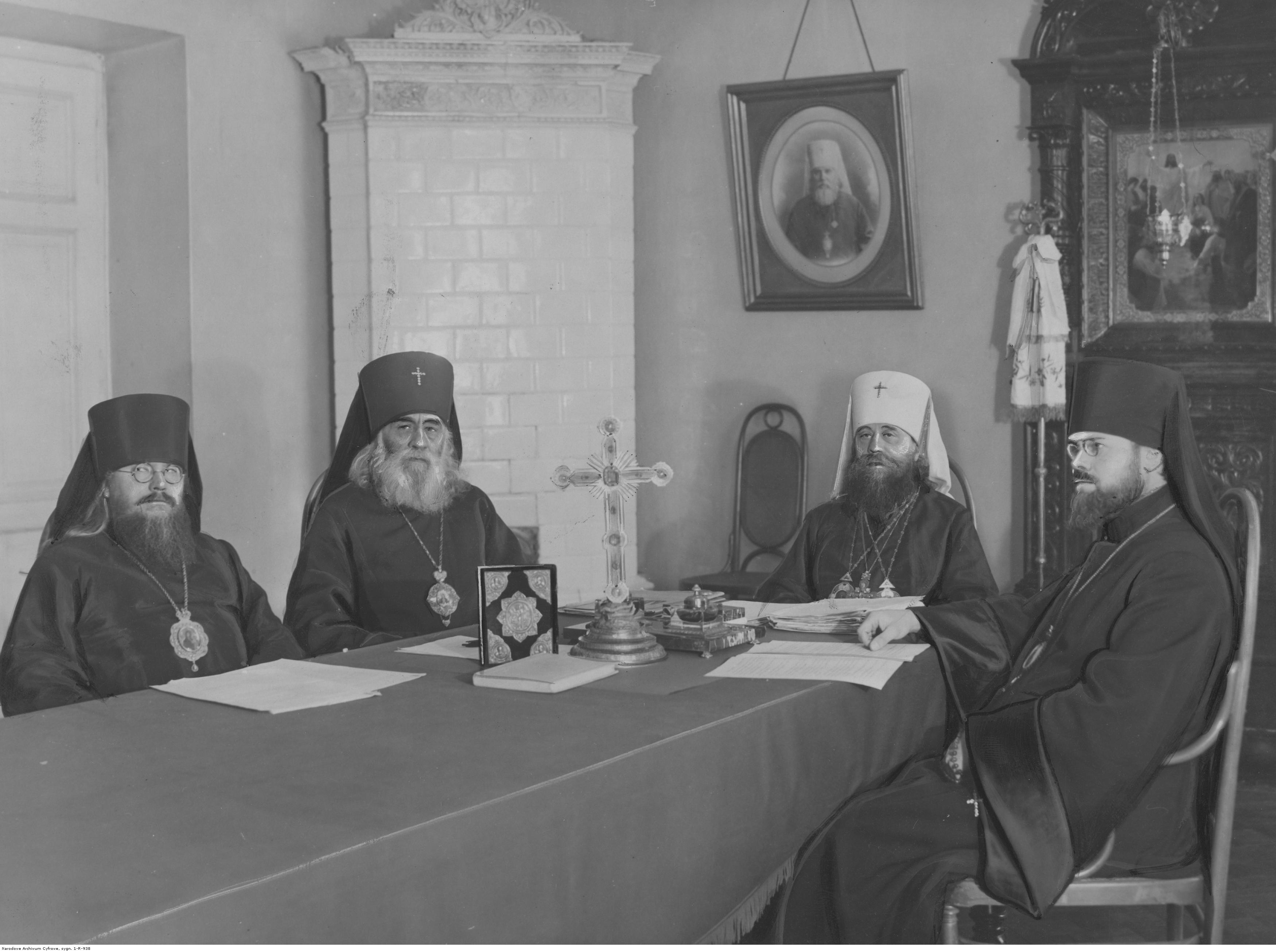 Spotkanie synodu biskupów PAKP: obecni od lewej biskup Aleksy (Hromadśki), arcybiskup Teodozjusz (Fieodosijew), metropolita Dionizy (Waledyński), biskup Aleksander (Inoziemcew)